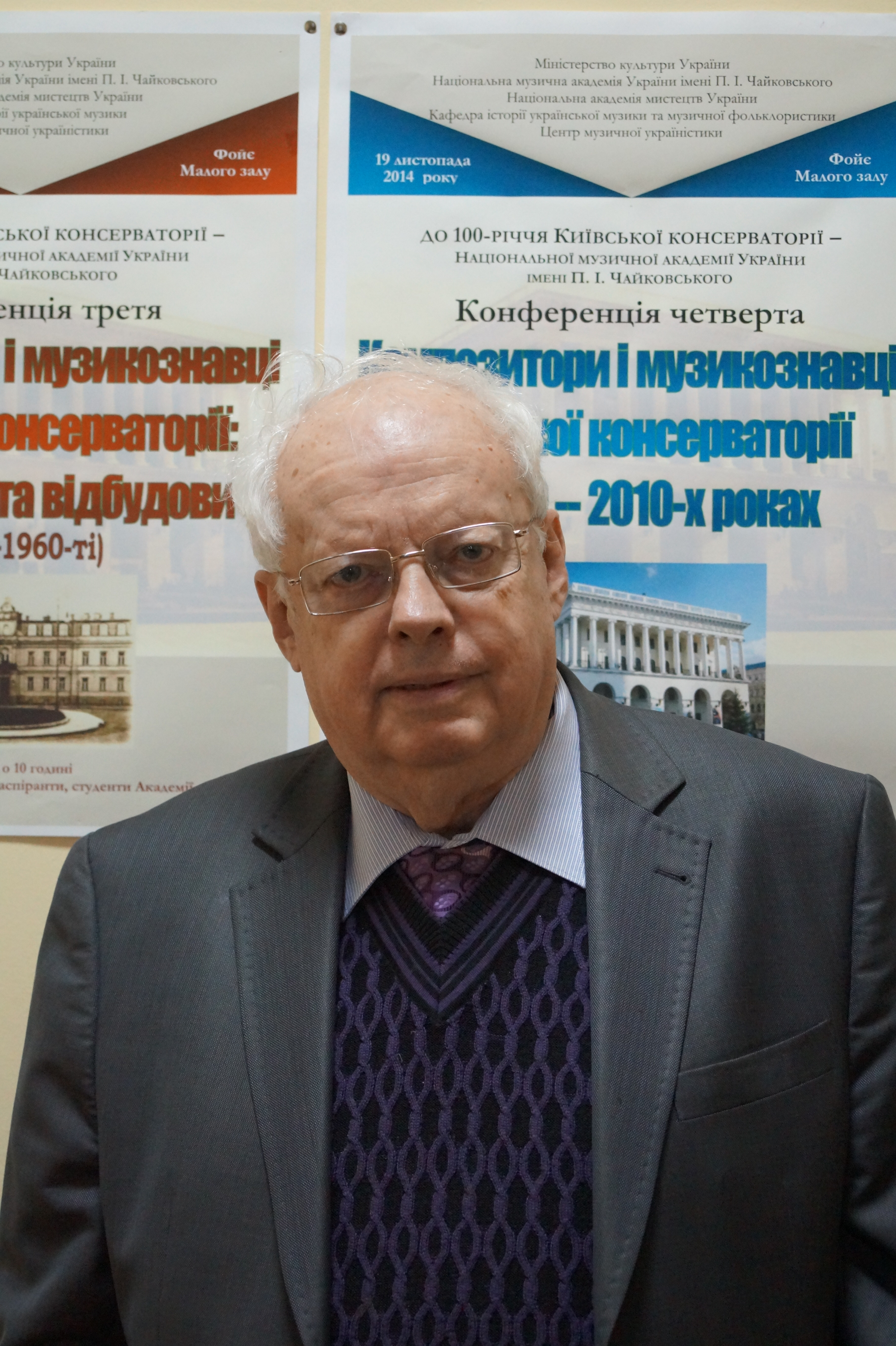 Мирослав Скорик а НМАУ ім.Чайковського